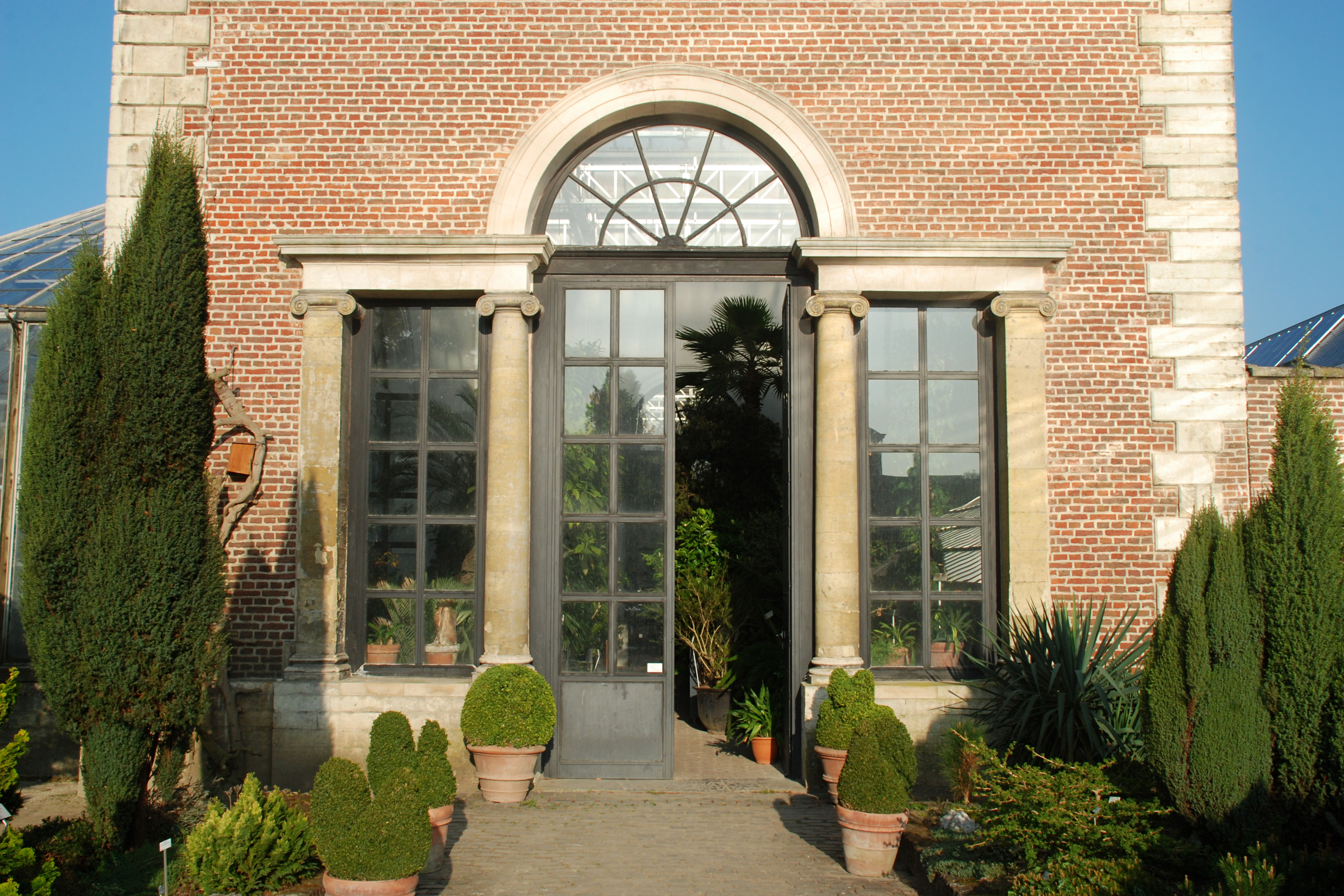 Belgique - Louvain - Jardin botanique (Kruidtuin) - orangerie néo-classique (architecte Charles Vander Straeten - 1821)